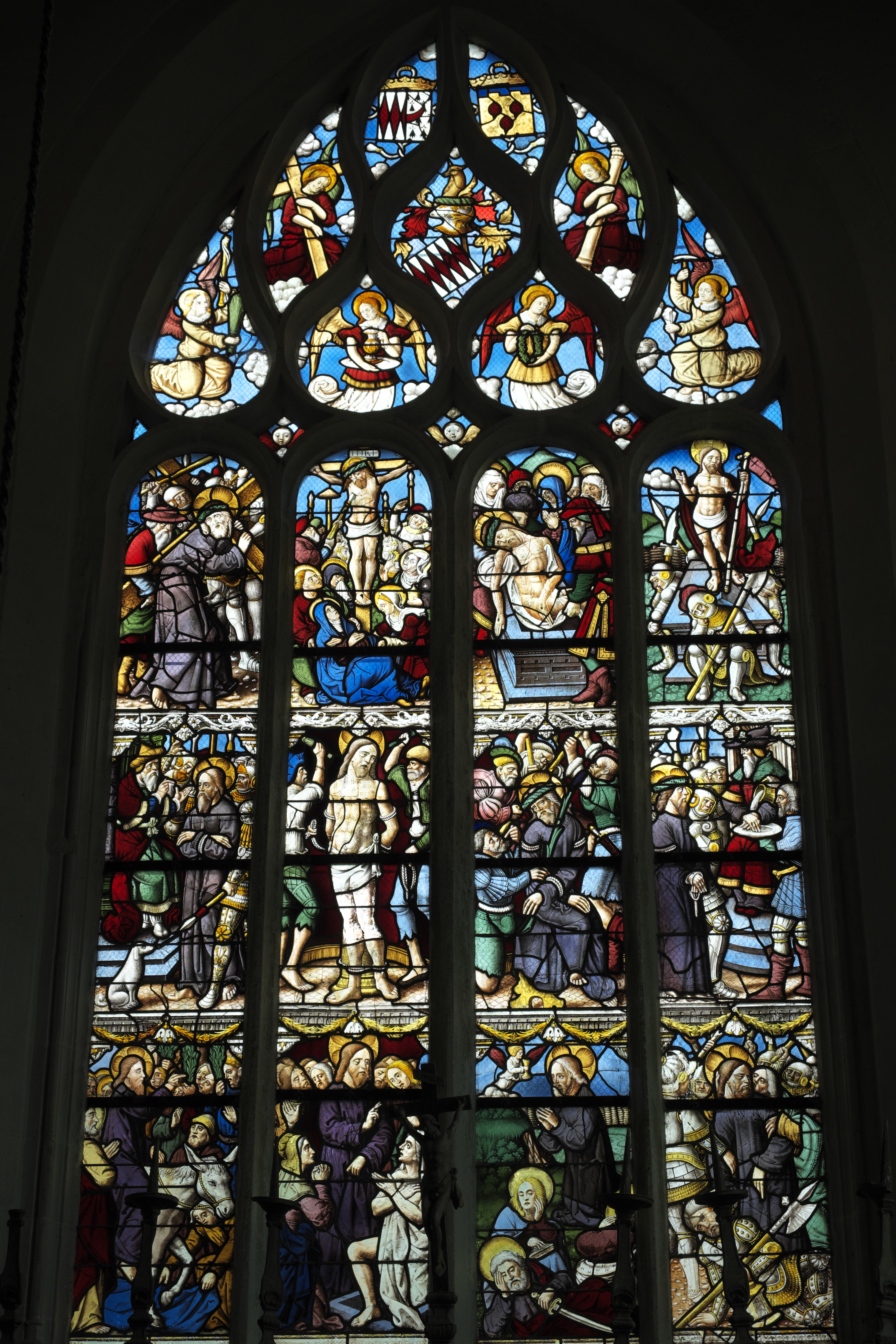 Kapelle Saint-Fiacre in Le Faouët im Département Morbihan (Region Bretagne/Frankreich), Bleiglasfenster Passionsfenster aus der Mitte des 16. Jahrhunderts